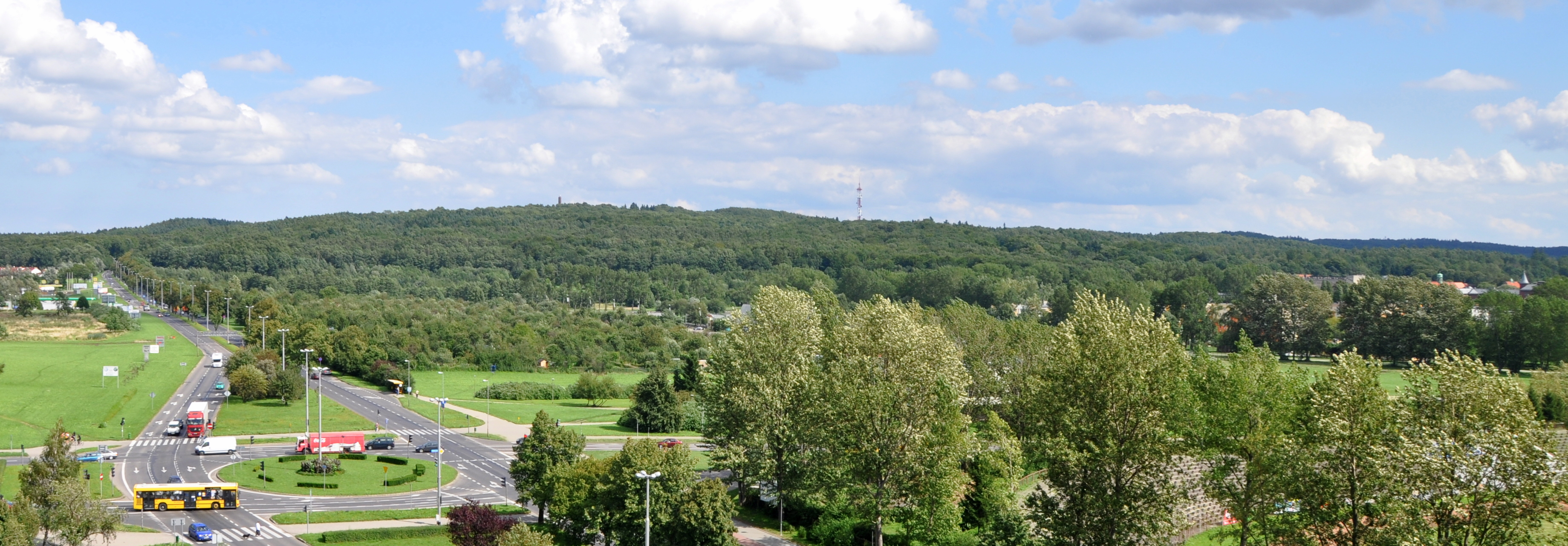 Wał morenowy Góra Chełmska (Gołogóra) – ujęcie z 10. piętra bloku przy Fałata 15 w Koszalinie